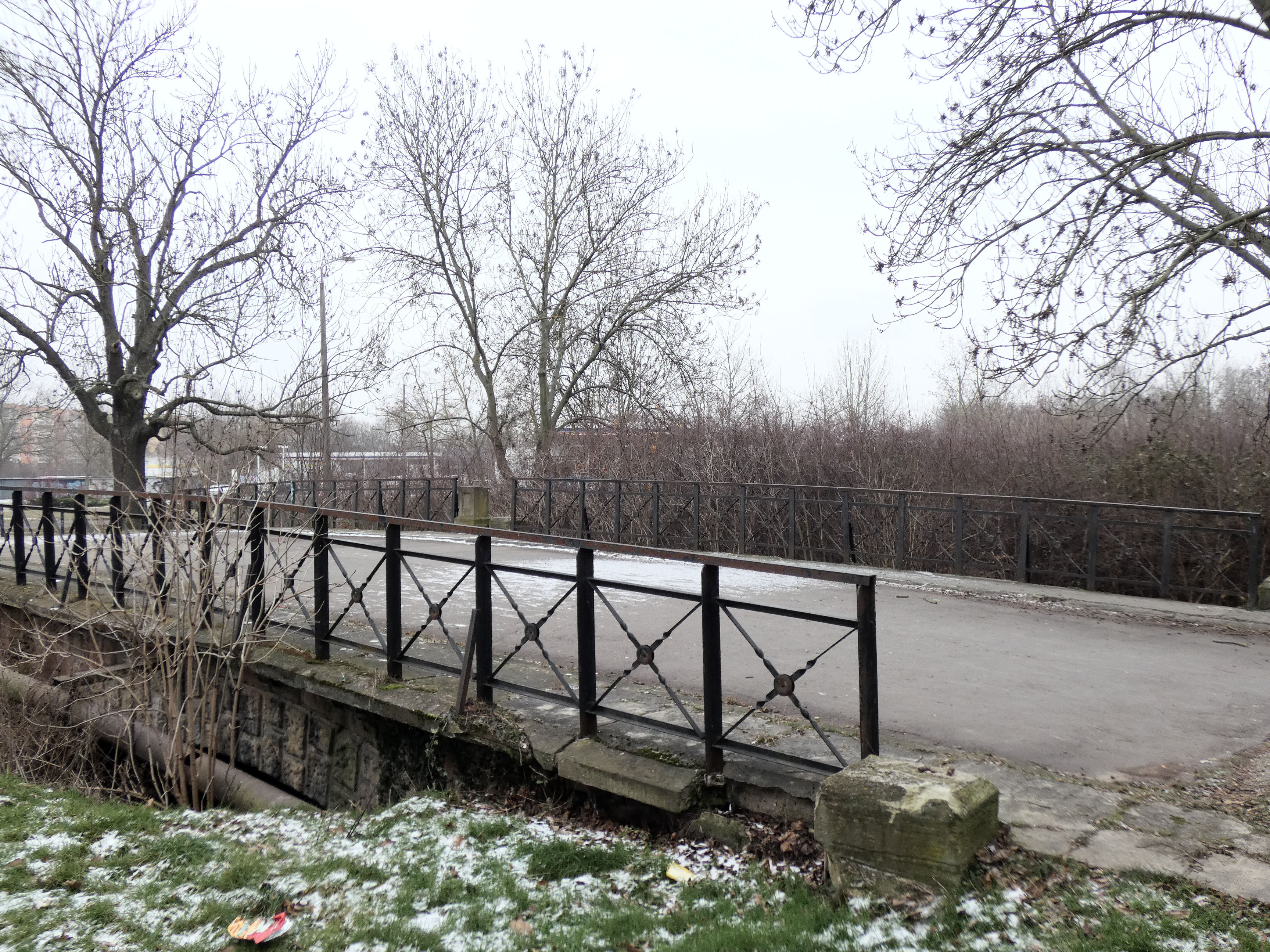 Zollbrücke Passendorf, Platz Drei Lilien, Südliche Neustadt, Halle (Saale)